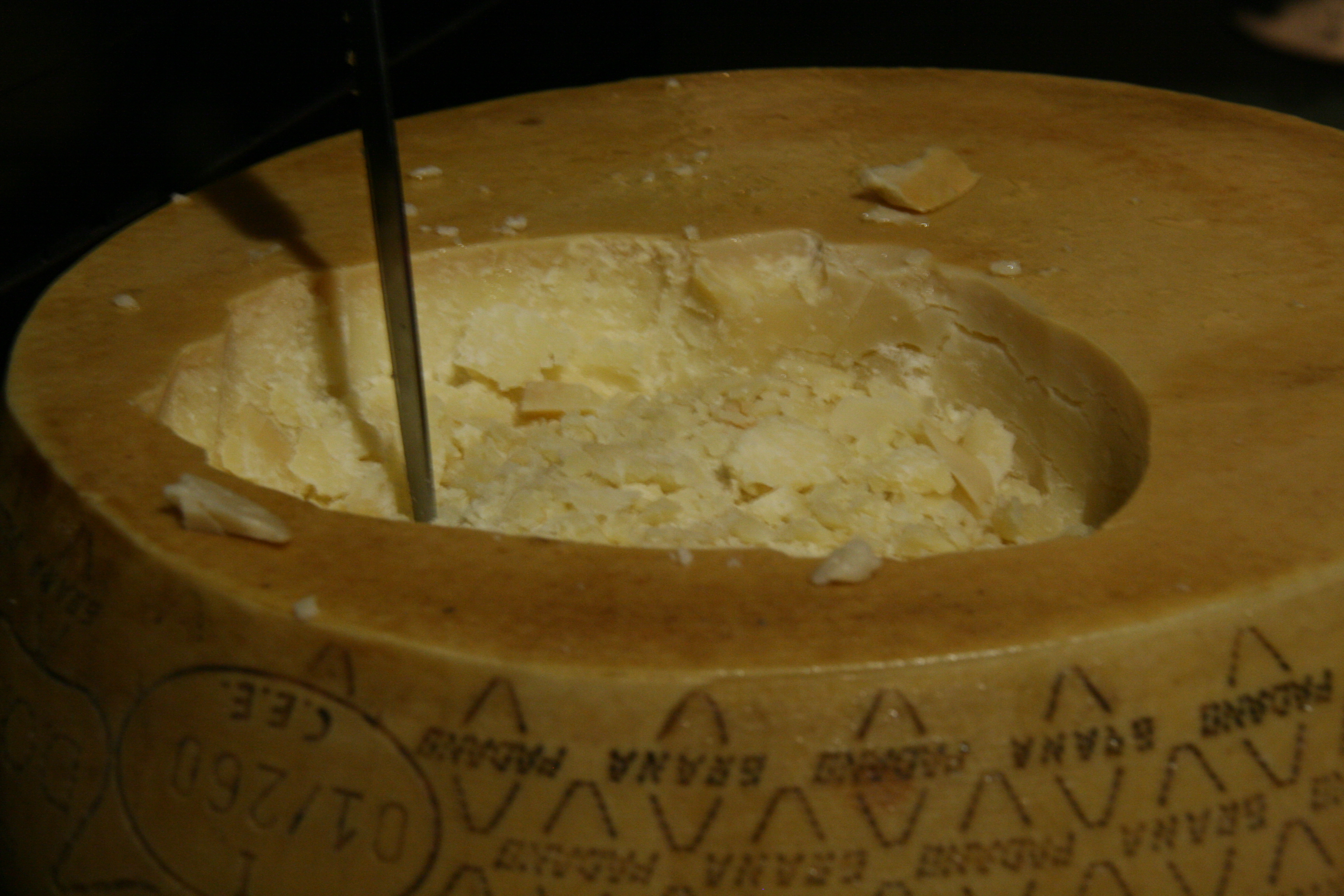 Grana Padano escavado